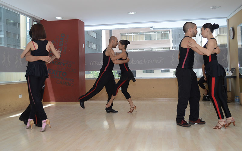 Quito, 14 de agosto de 2014 (Andes) .- Los ensayos de Tropical Dance previos al Ecuador Salsa Contest. Foto: Carlos Rodríguez L.